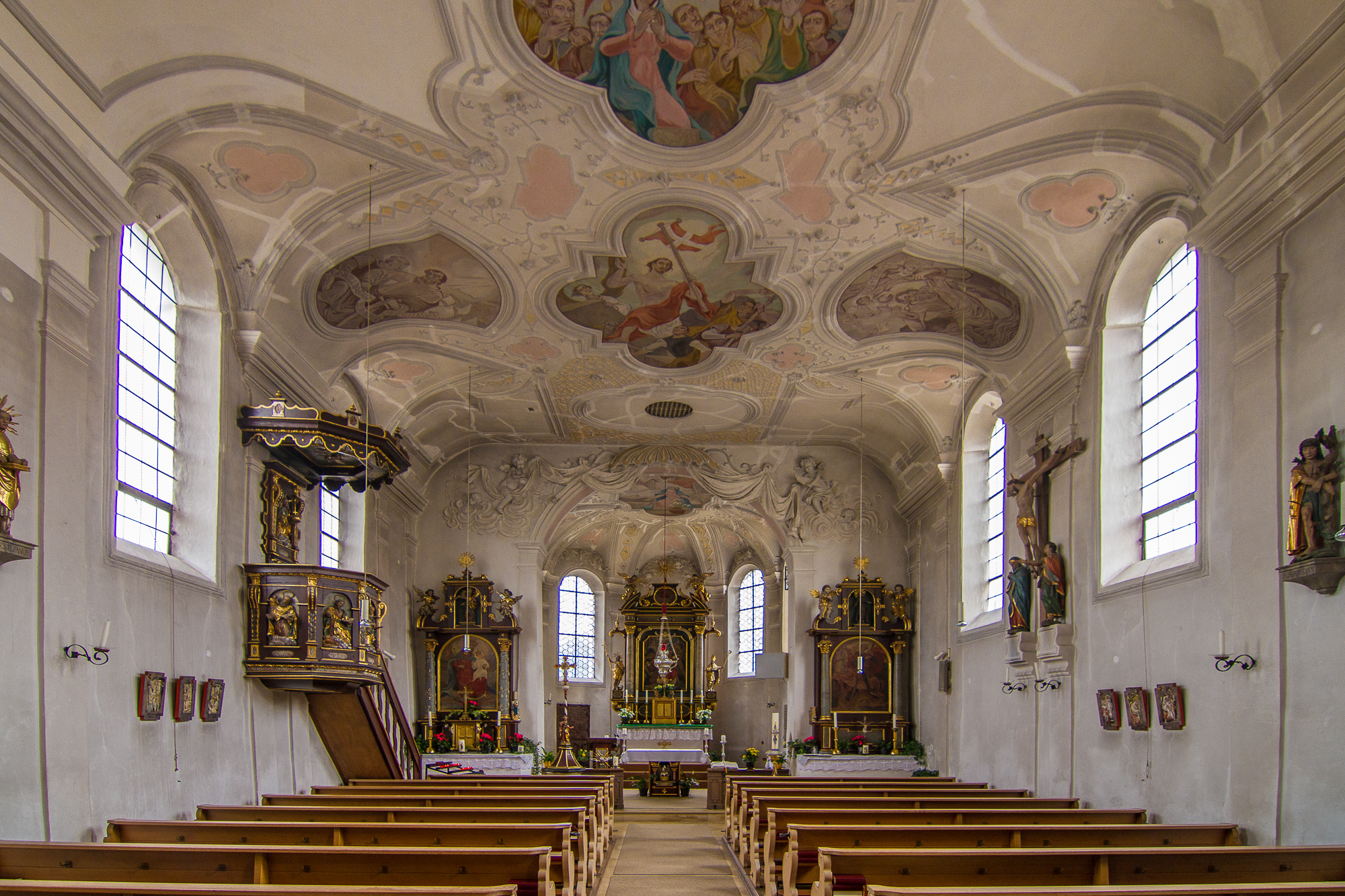 Katholische Pfarrkirche St. Stephan erbaut 2. Hälfte 17. Jahrhundert; mit Ausstattung.This is a photograph of an architectural monument.